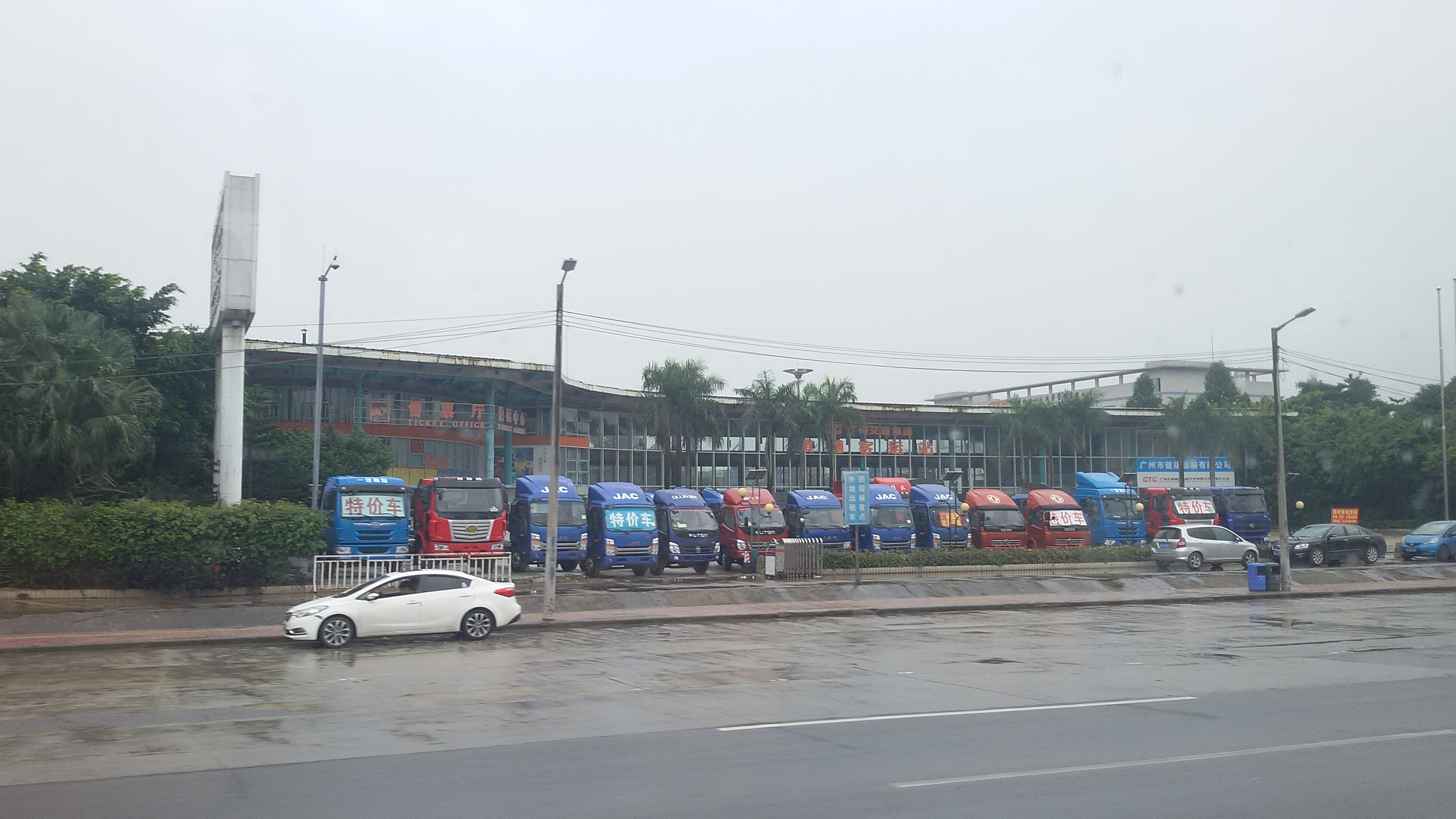 粵語: 黃埔汽車客運站